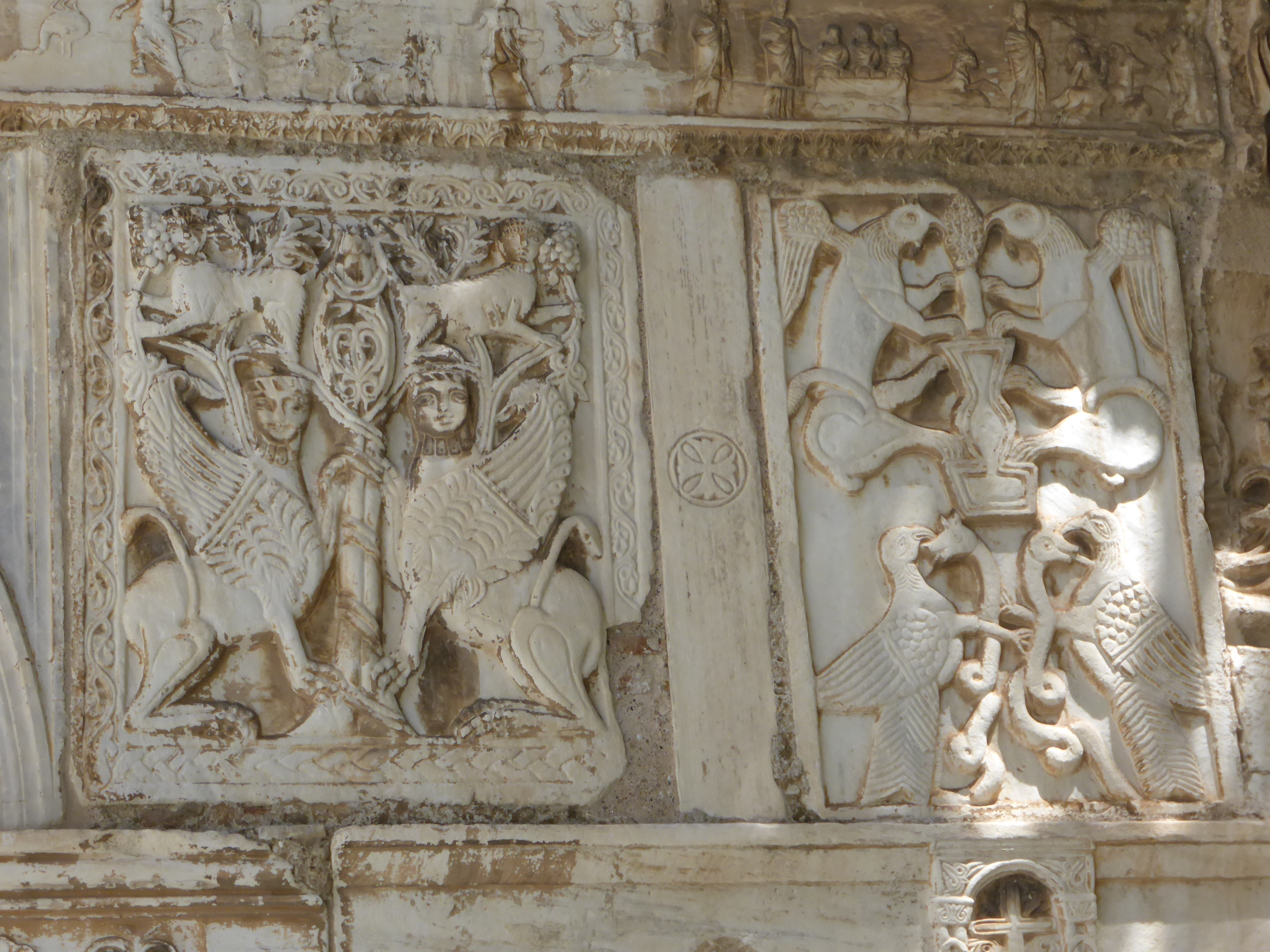 Panagia Gorgoepikoos, zwei Spolien mit Sphingen und Greifen